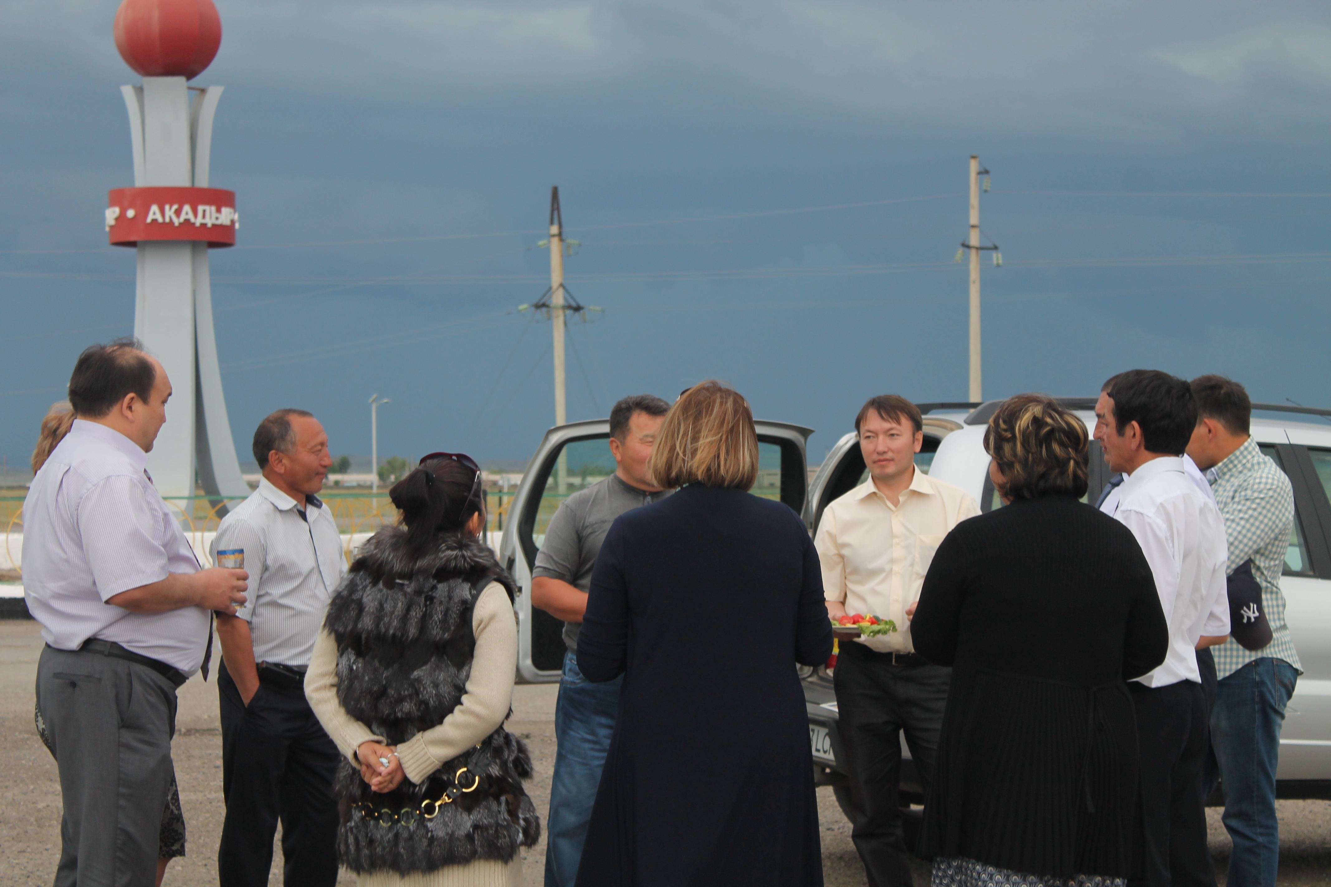 Заезд в Агадырь